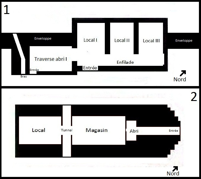 Plan de la caserne et du massif de terre de la batterie annexe sud-puest du fort de Planoise, à Besançon (Doubs, France).